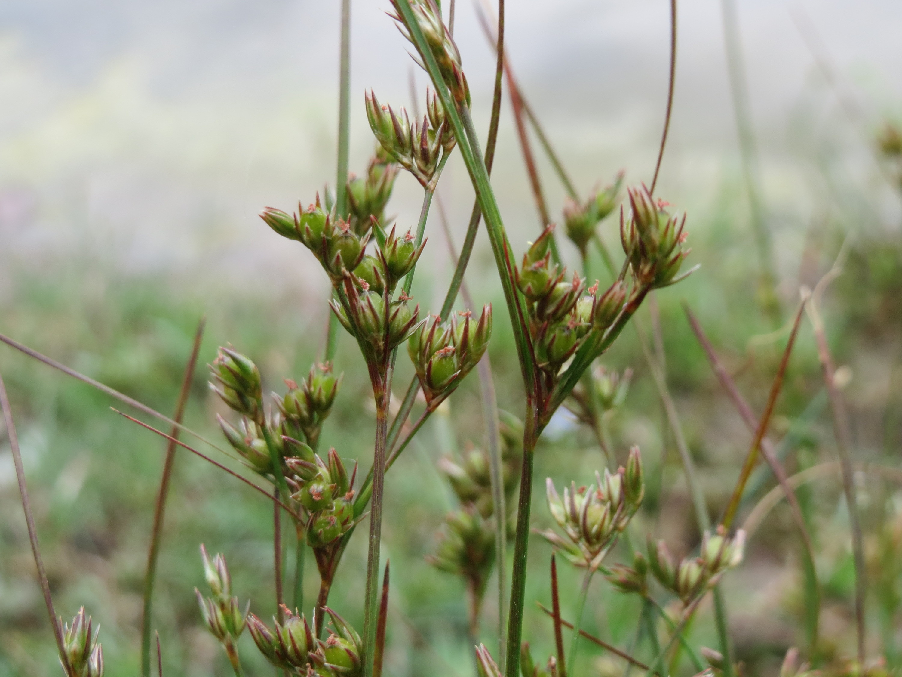 Zarte Binse (Juncus tenuis) im Bürgerpark Saarbrücken